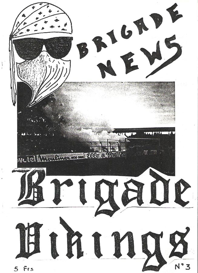 une du fanzine Brigade news du groupe de supporters de Caen la Brigade Vikings